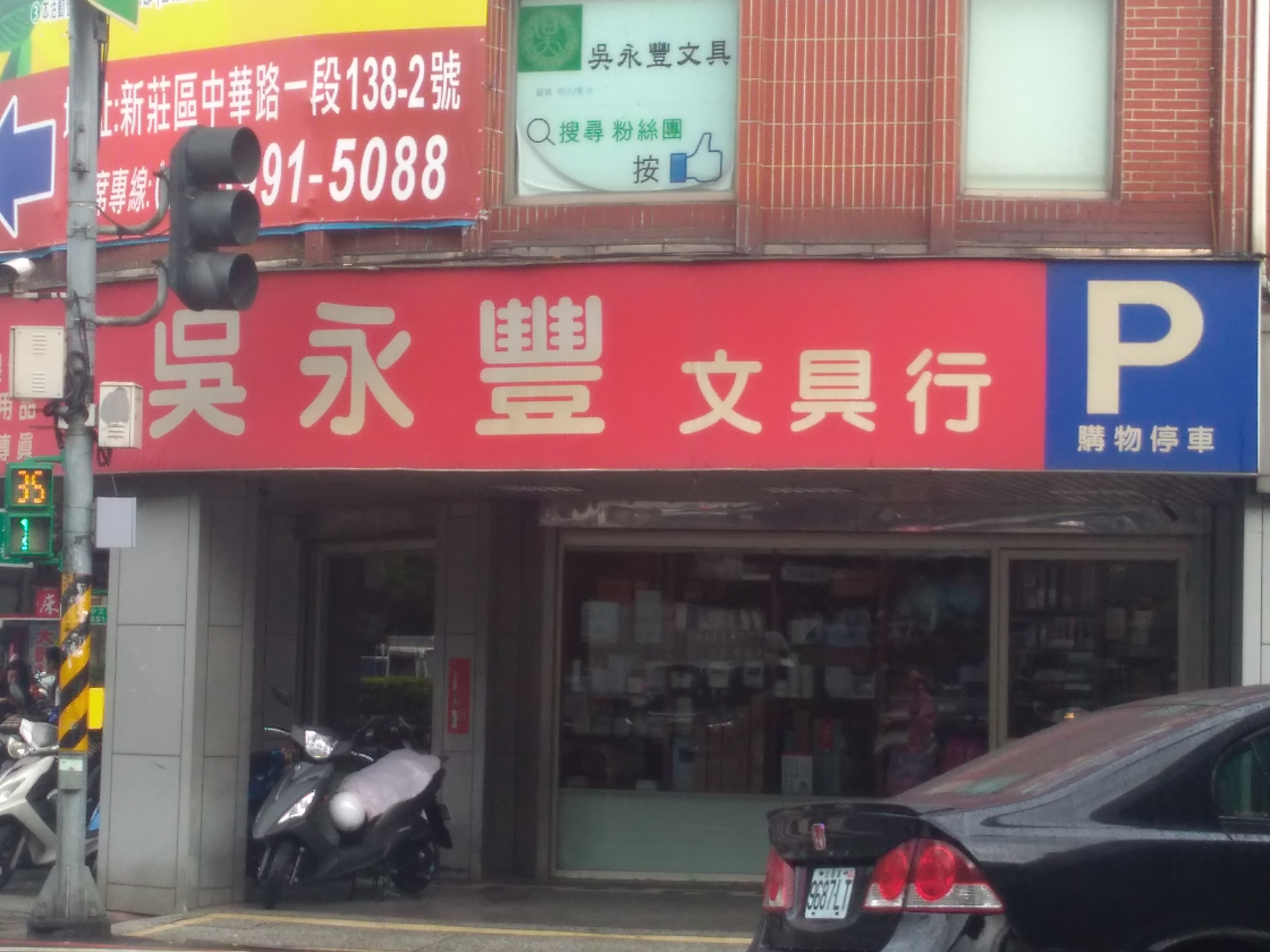 中文（台灣）: 吳永豐文具行